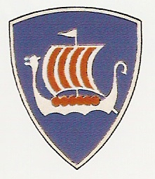 Wappen